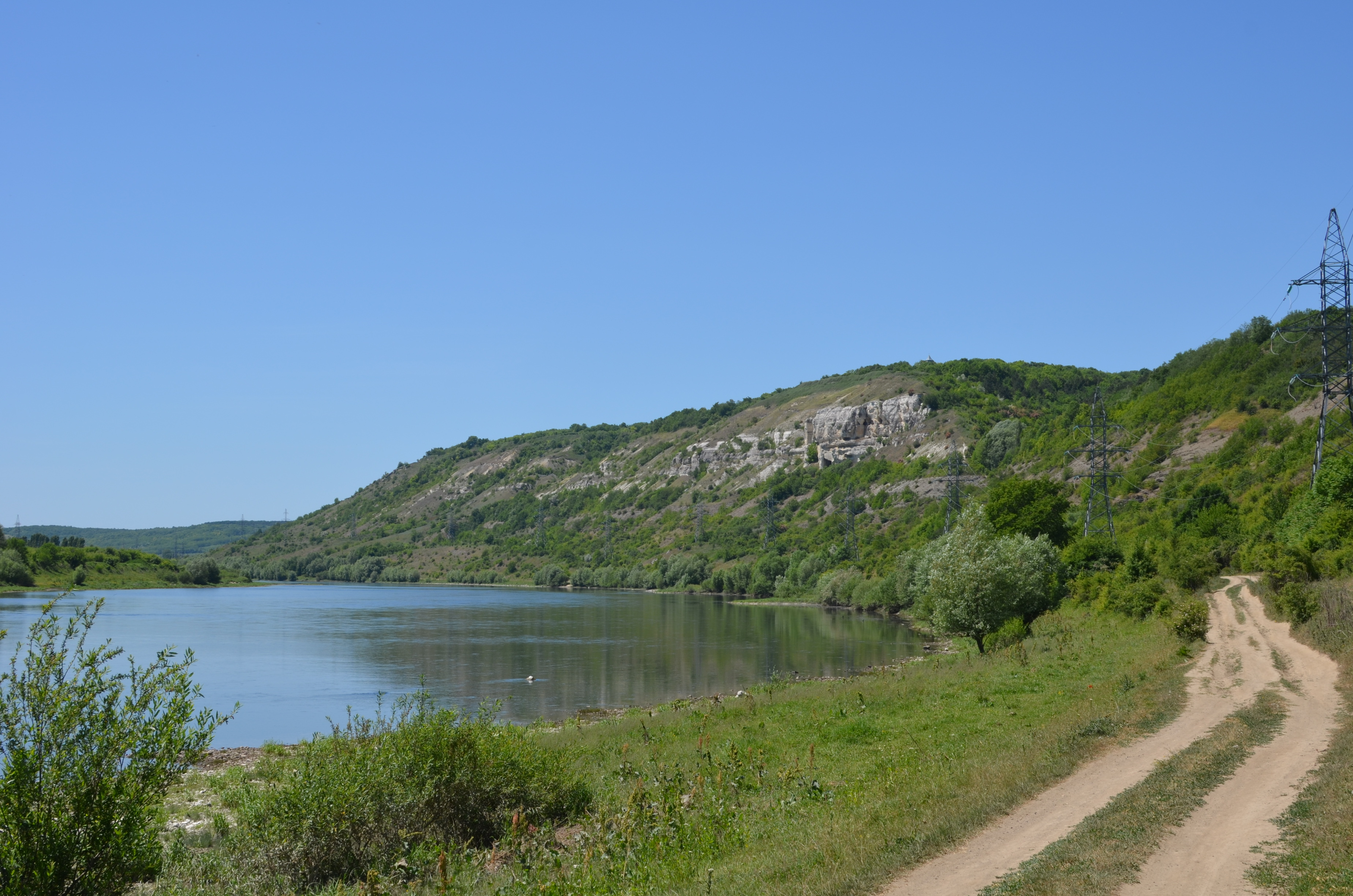 Печери, Могилів-Подільський район, Козлівська сільська рада, с. Нагоряни